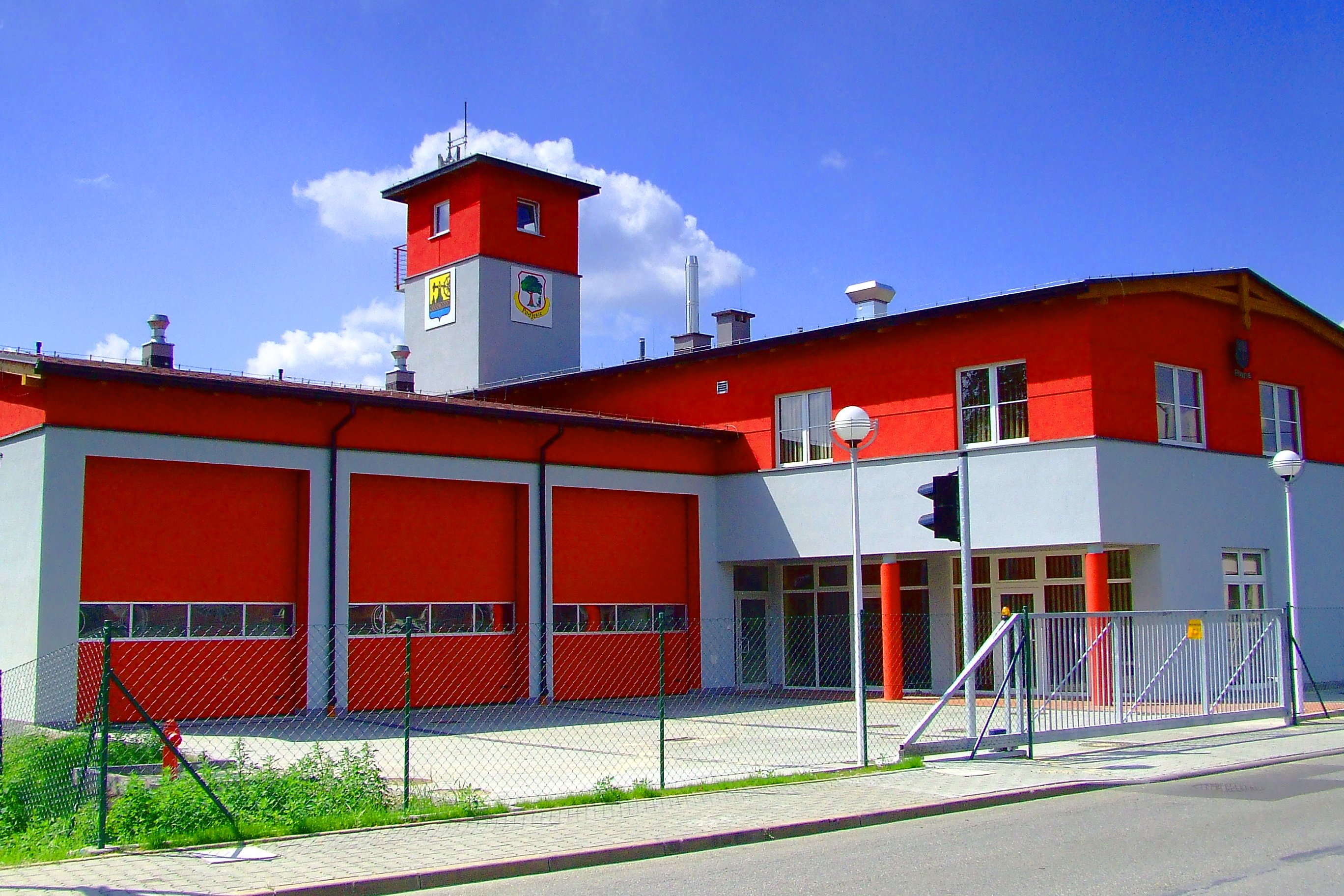 Budynek Strazy Pozarnej w Podlesiu